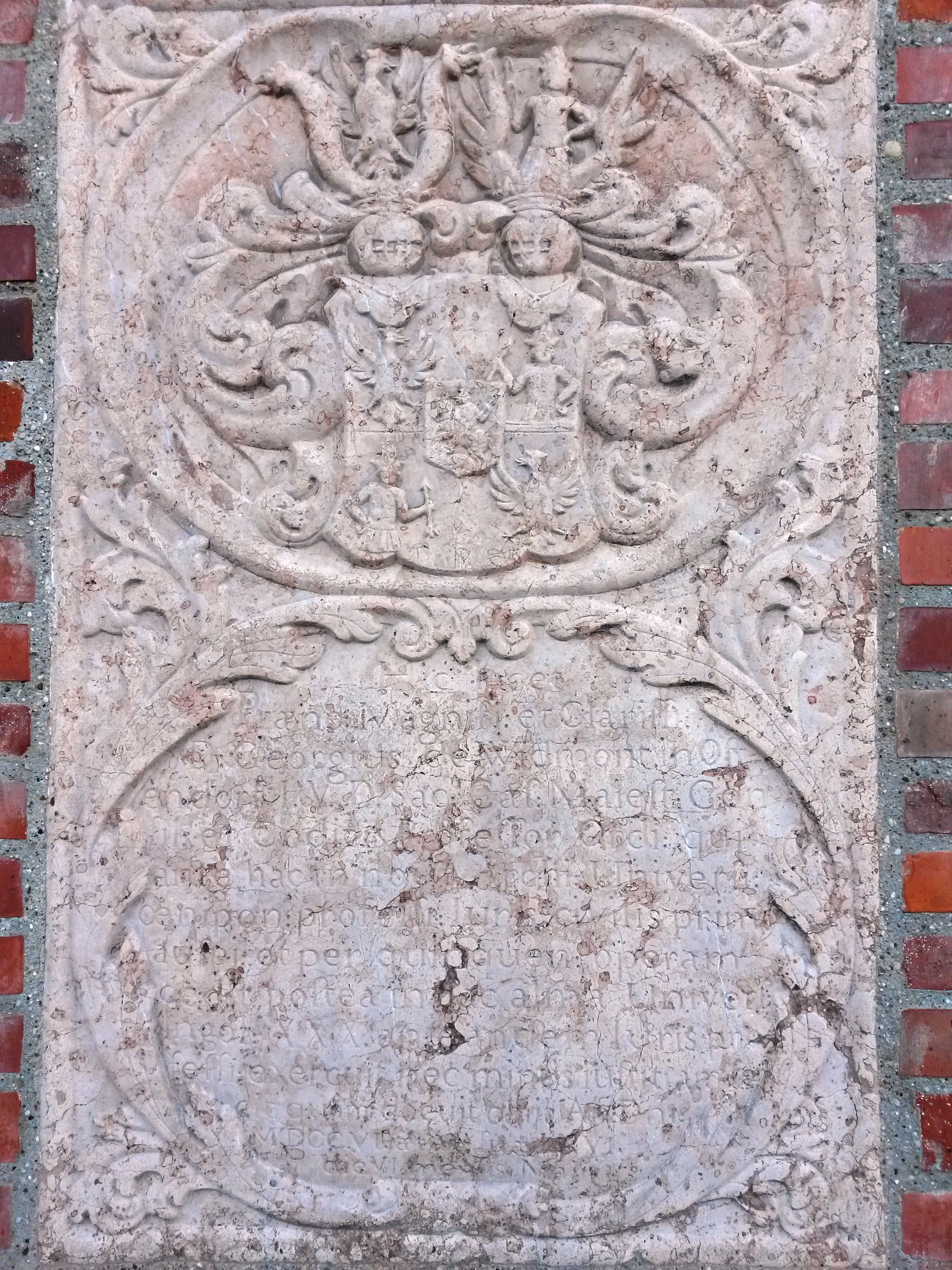 Epitaph des Georg von Widmont am Nordportal des Liebfrauenmünster in Ingolstadt